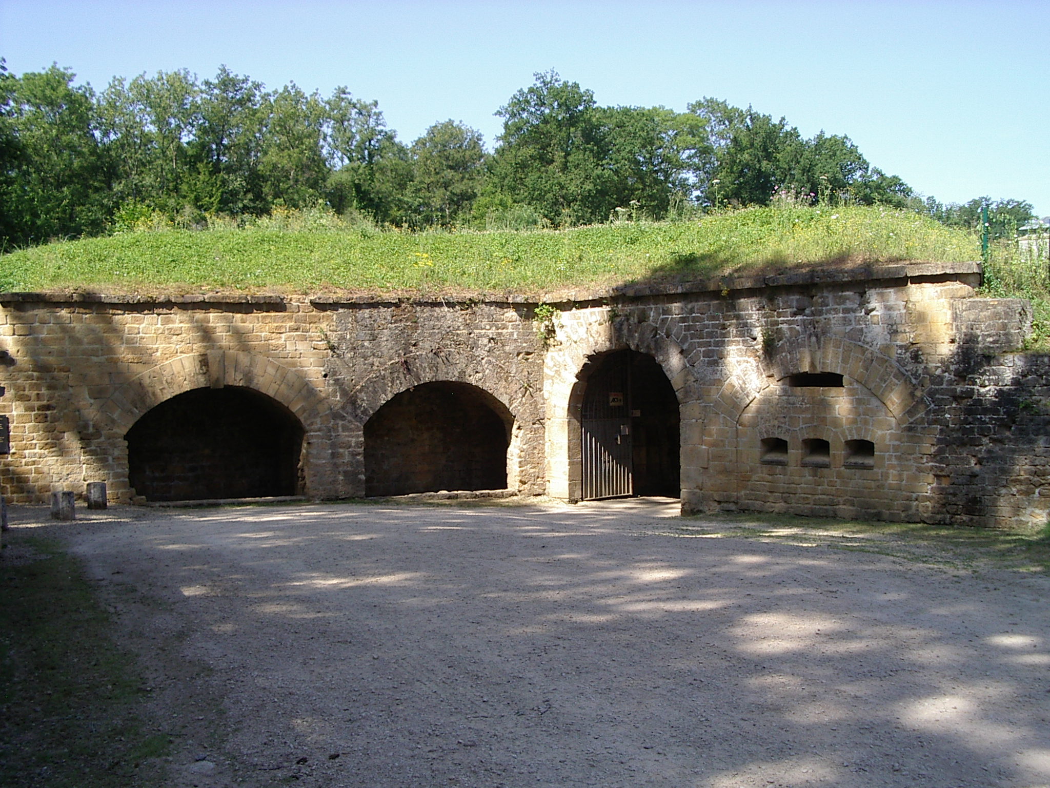 Le Fort des Ayvelles est un ouvrage militaire situé sur le territoire des communes de Villers-Semeuse et des Ayvelles dans les Ardennes.